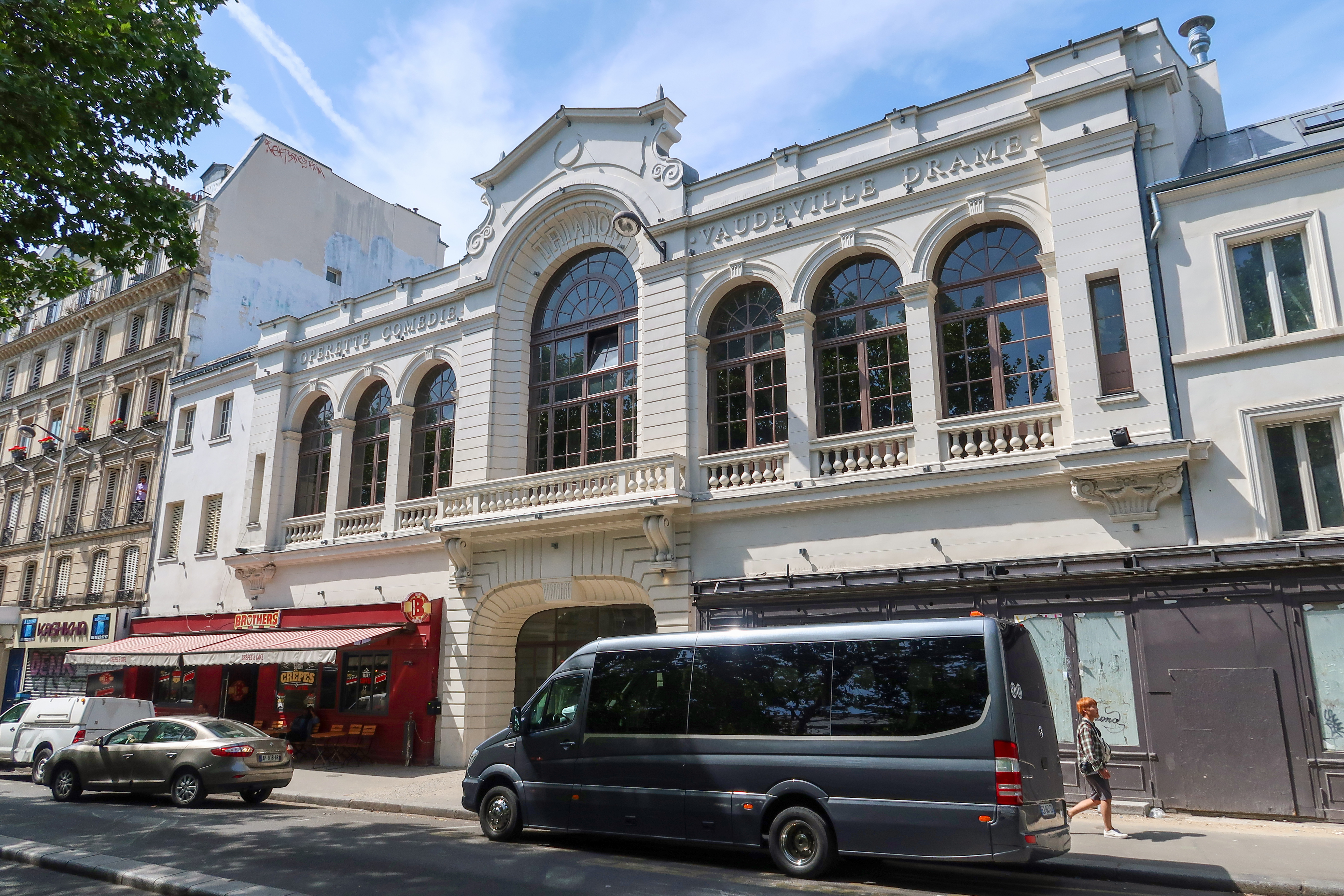 Le Trianon, 80 boulevard de Rochechouart (Paris, 18e).